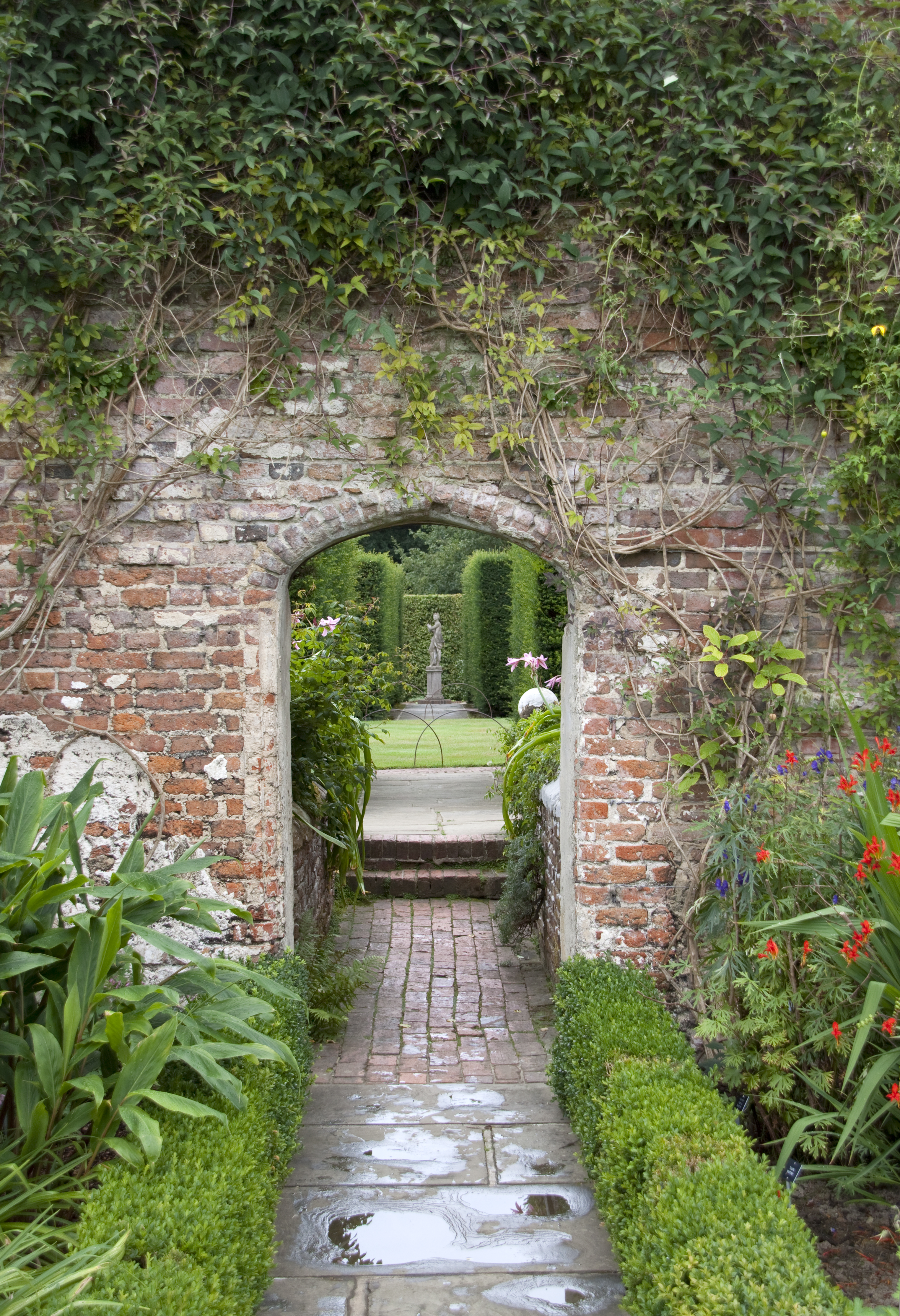 Sissinghurst Gardens 5